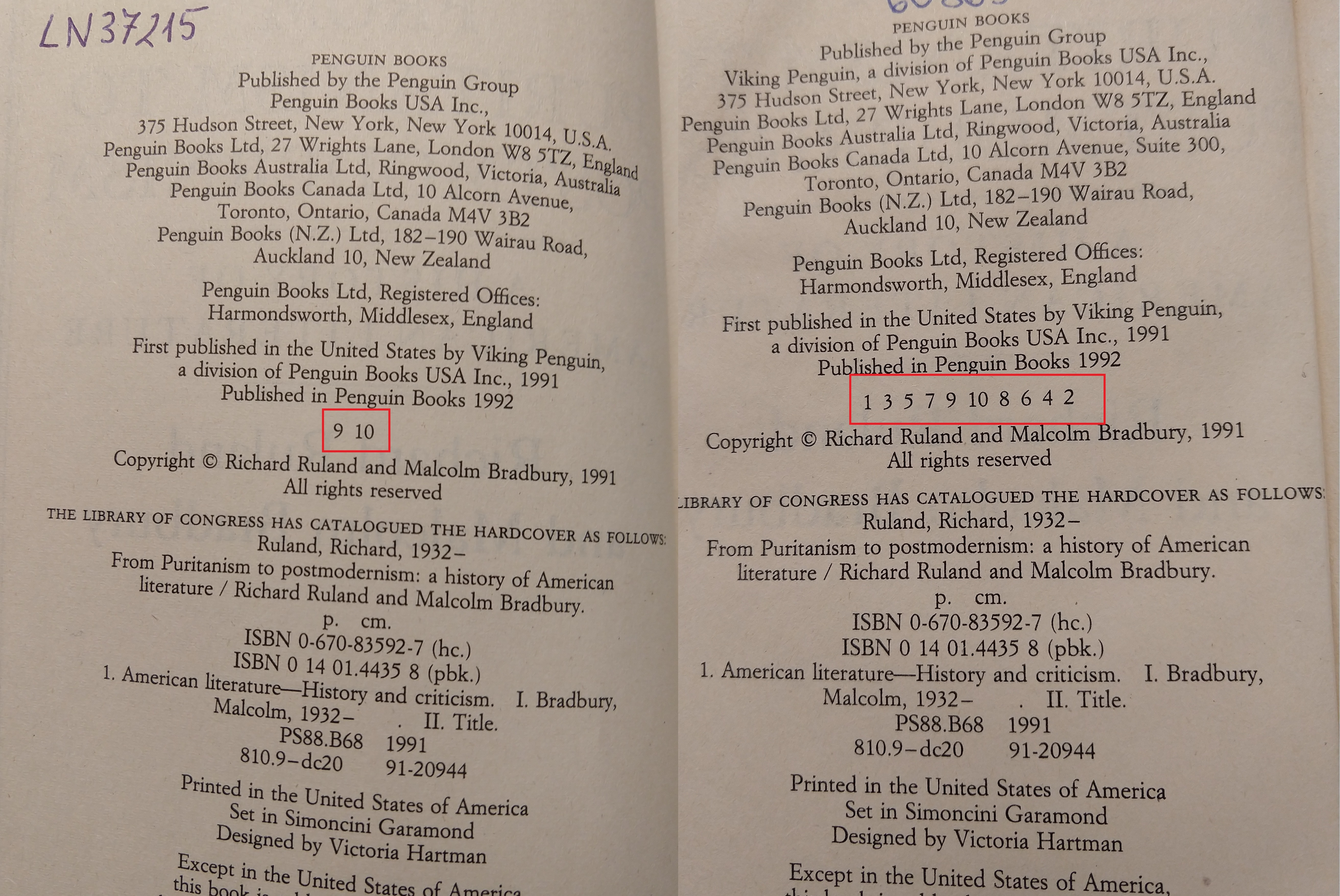 Strony redakcyjne dwóch różnych druków tej samej książki